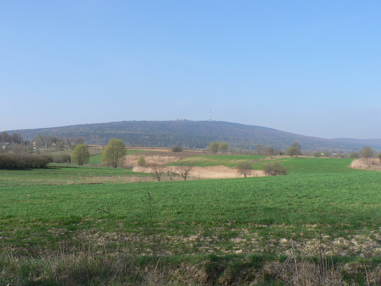 Łysa Góra ze Starej Słupi